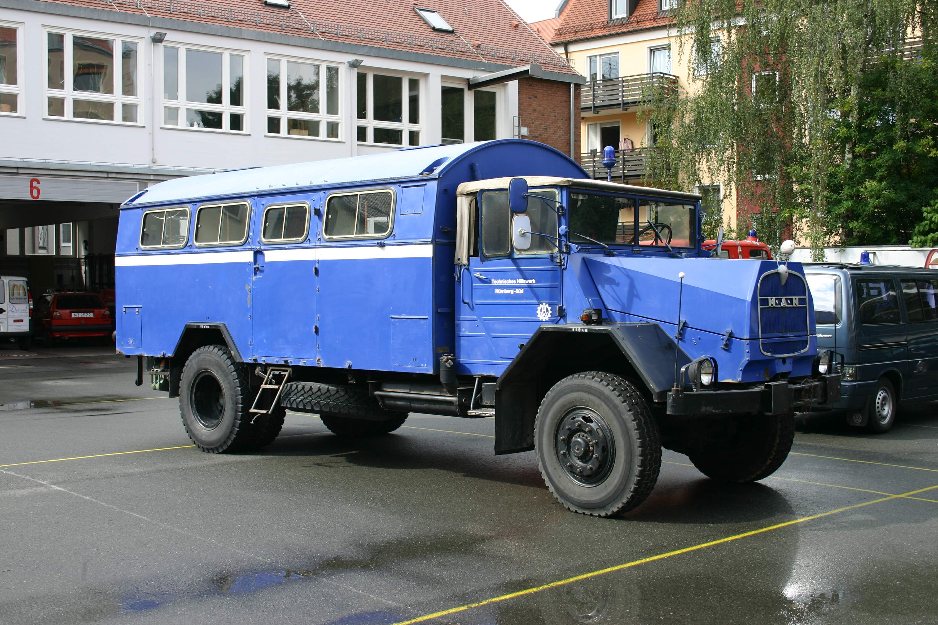 Einsatzleitwagen des THW (ehemals THW Nürnberg; Spitzname EMMA)